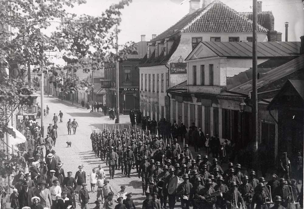 Saksa vägede paraad Tartus Raatuse tänaval